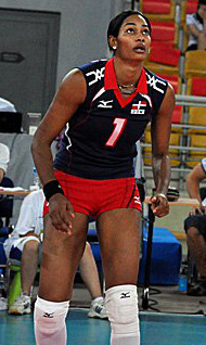 La pallavolista Annerys Vargas